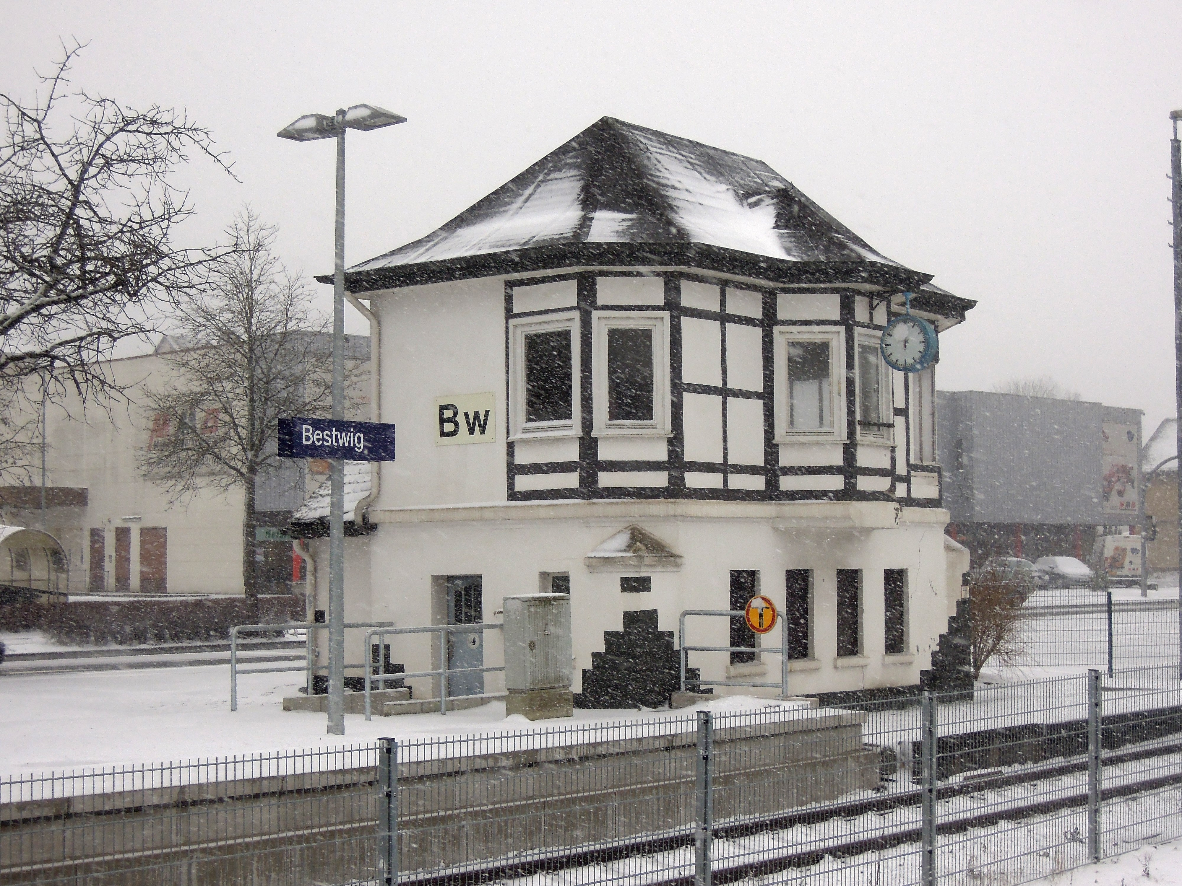 Stellwerk in Bestwig im Winter.